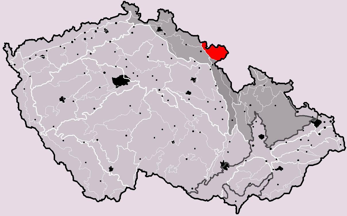 Poloha geomorfologického celku Broumovská vrchovina v rámci České republiky. Hercynský systém Hercynská pohoří I Česká vysočina I4 (IV) Krkonošsko-jesenická subprovincie I4B (IVB) Orlická oblast I4B-1 (IVB-1) Broumovská vrchovina